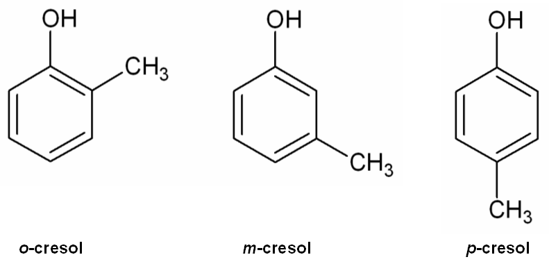 Cresol